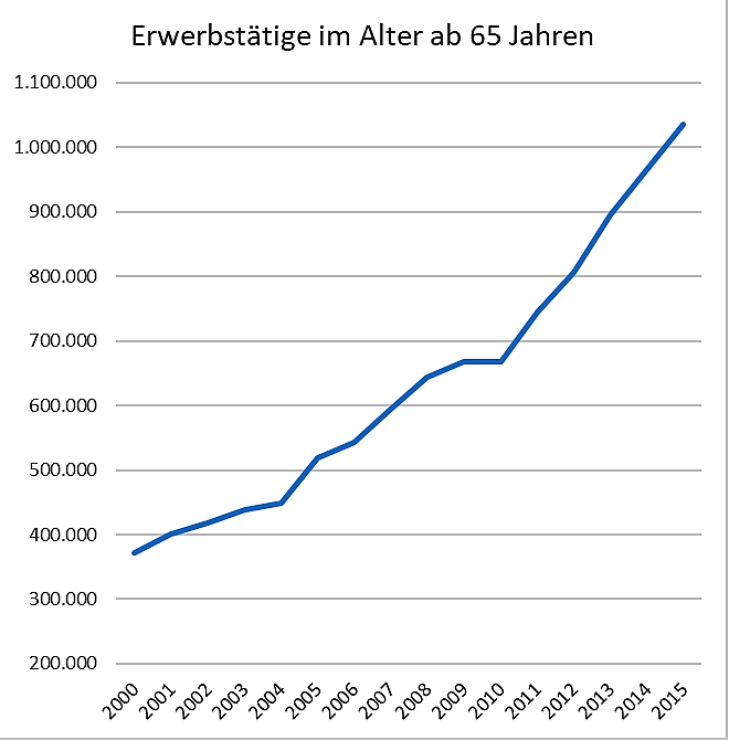 Erwerbstätige im Alter ab 65 Jahren, basierend auf Daten aus Kleiner Anfrage an Bundesregierung, 18/12488